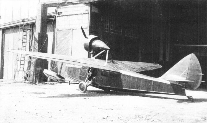 Shavrov Sh-7